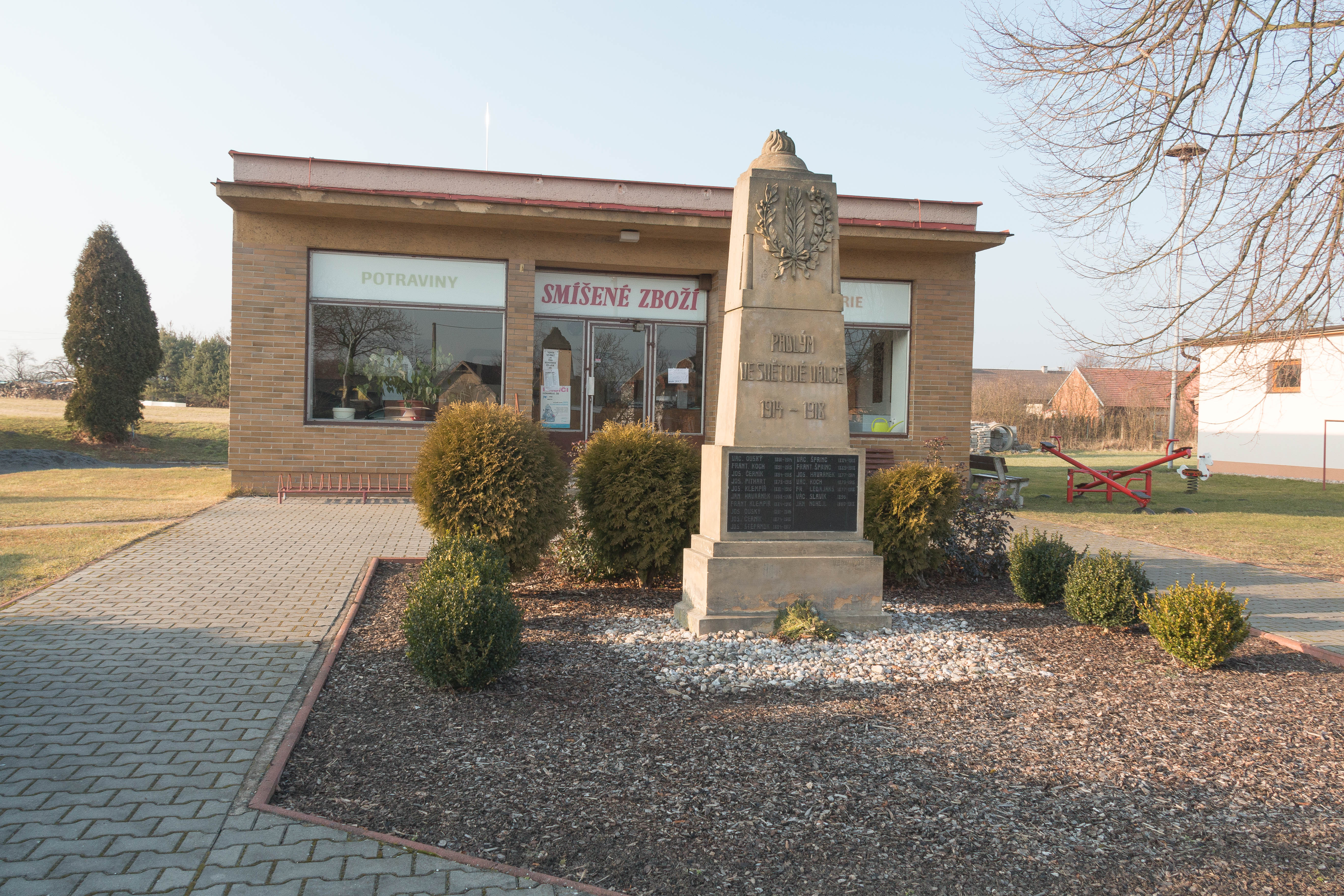 Přelovice pomník padlých